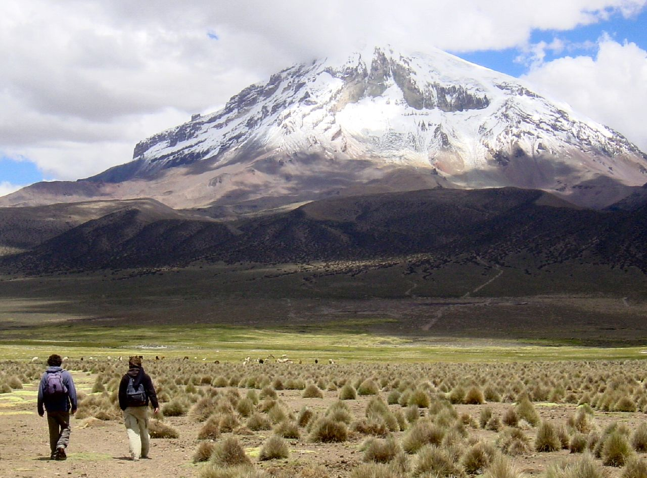 sajama national parc bolivia